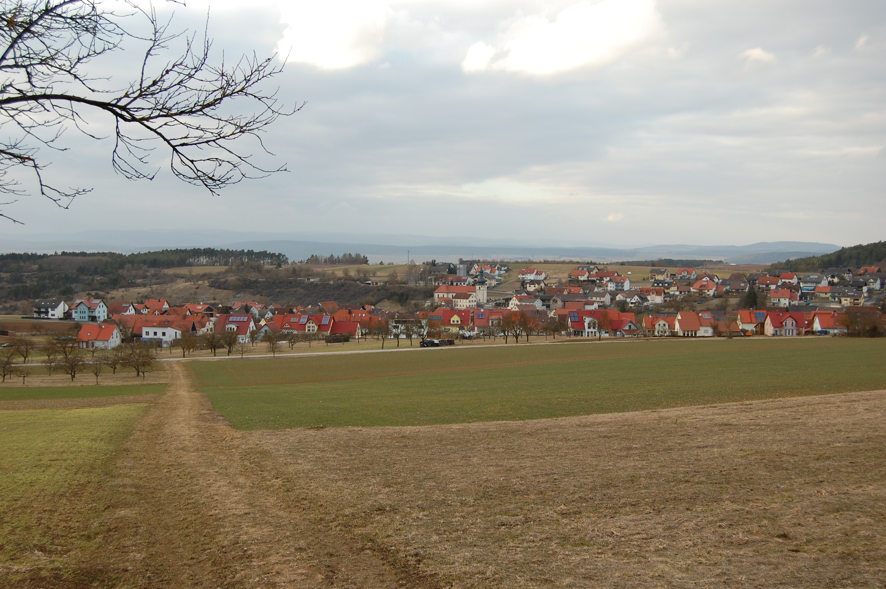 Strahlungen, Kreis Rhön Grabfeld, Ortsansicht (2011)